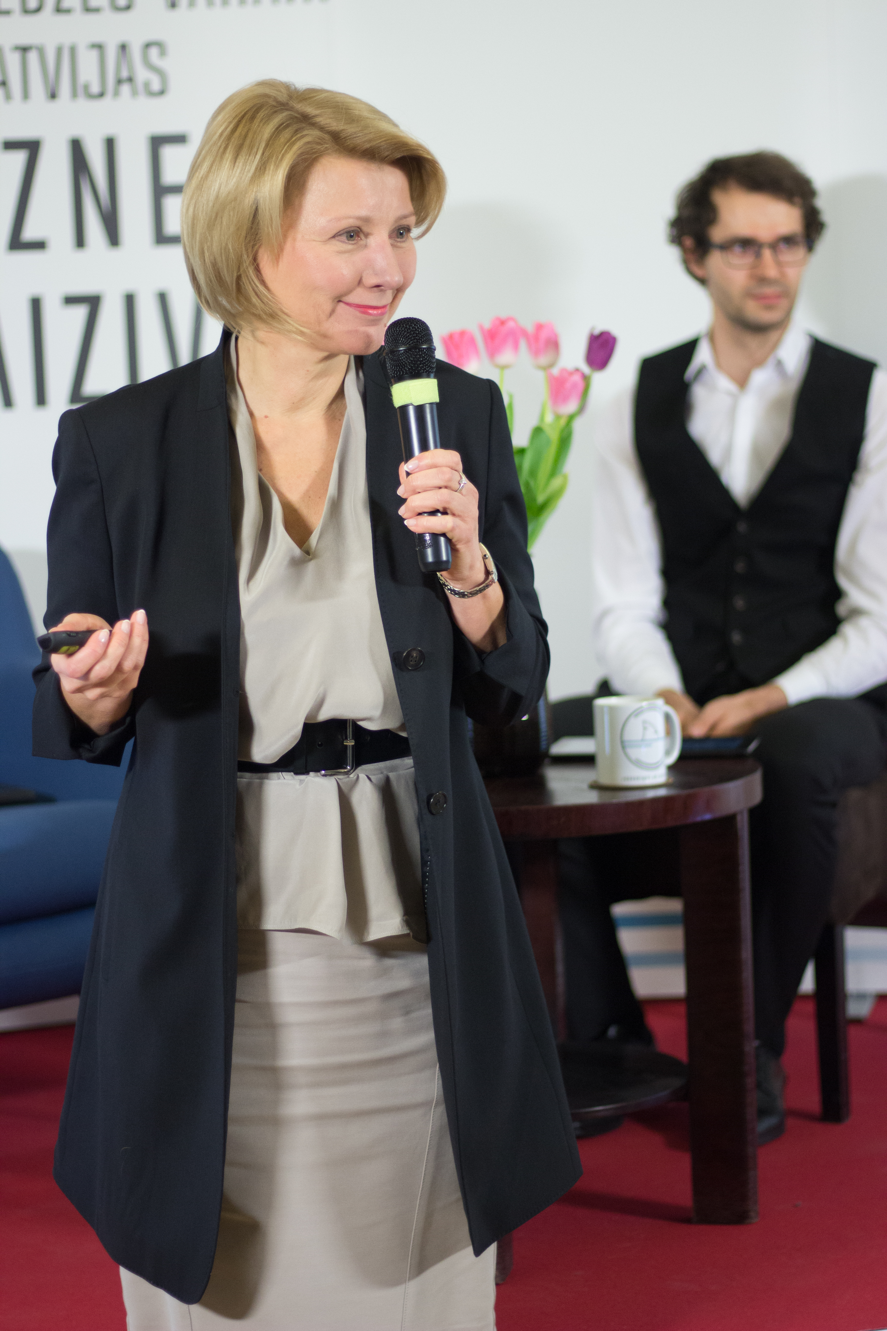 Ieva Plaude-Rēlingere